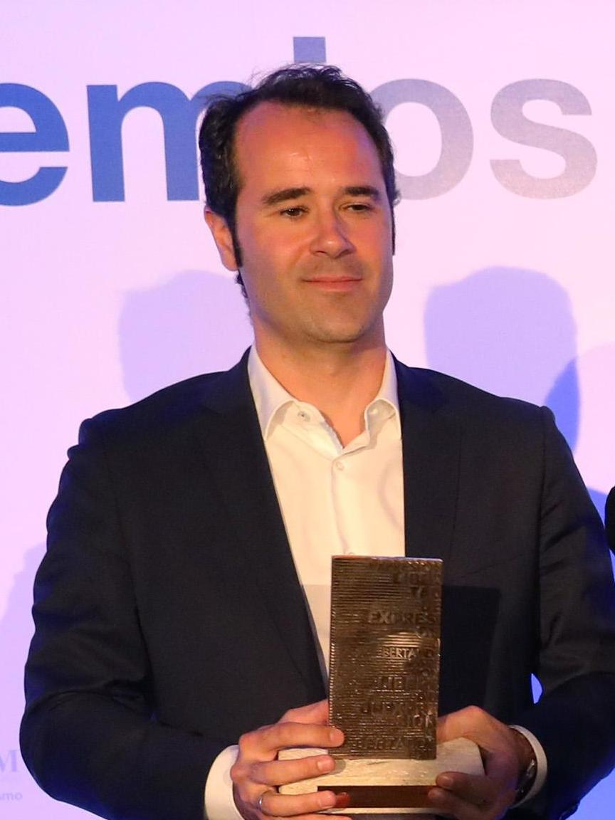 Entrega de premios de la Asociación de la Prensa de Madrid, que este año celebra su 80 edición. Se ha premiado la labor de Mariano Guindal, premio APM de Honor 2018; Javier Chicote, premio APM al Mejor Periodista del año 2018; María José Escalera; premio APM al Periodista Especializado en Madrid 2018, y a Blanca Pou, premio APM al periodista Joven del Año 2018.